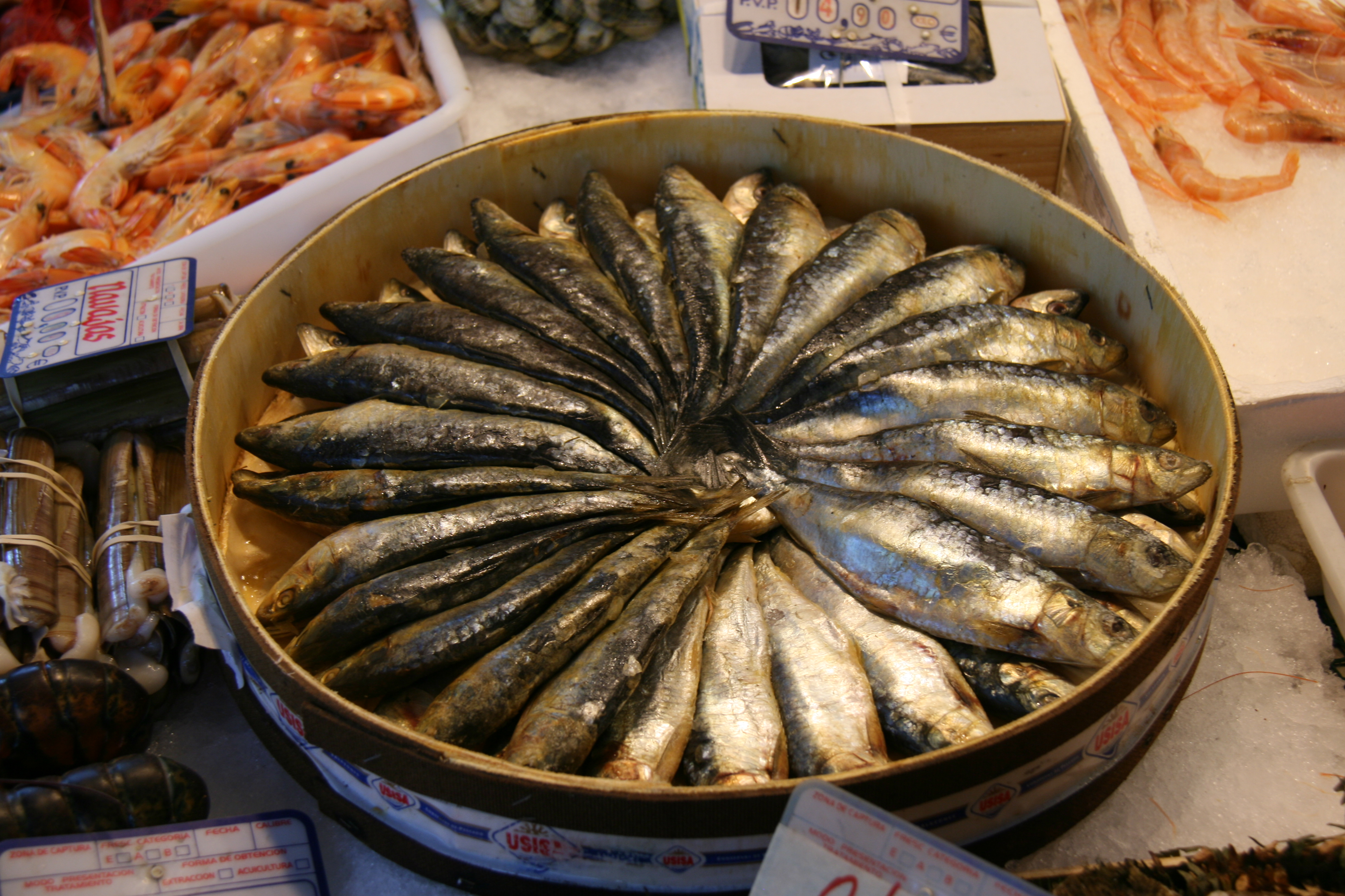 Sardinas en salazón